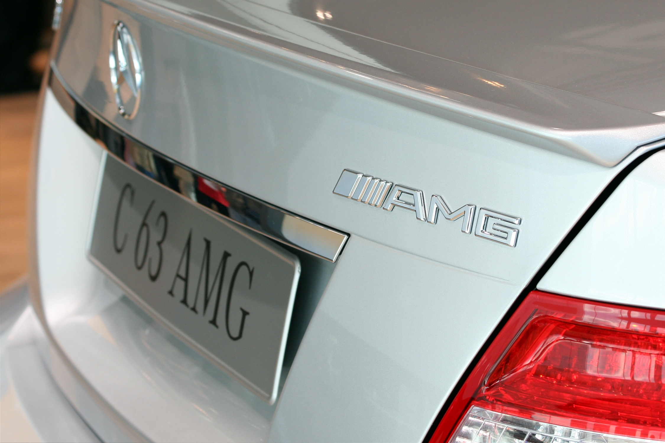 Mercedes-Benz AMG C-Class (W204)